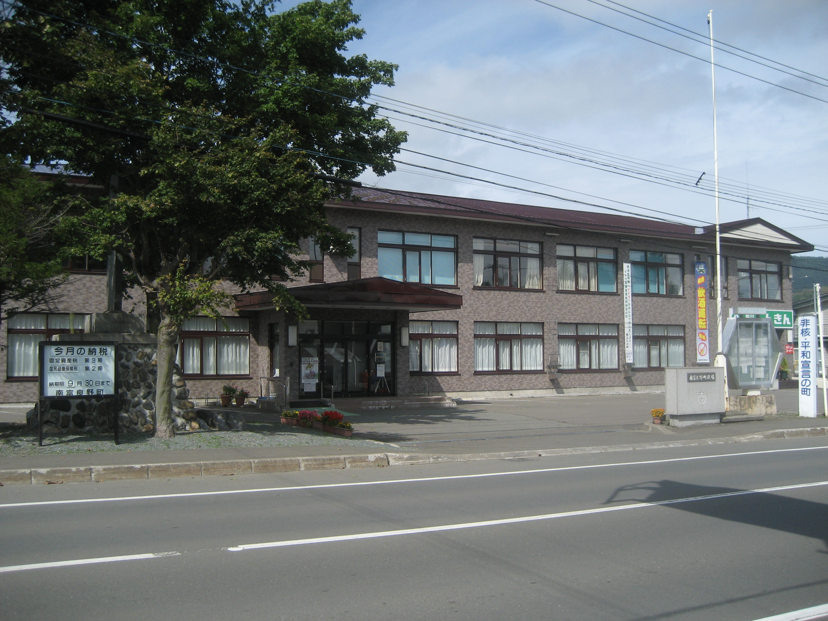 北海道にある南富良野町役場庁舎